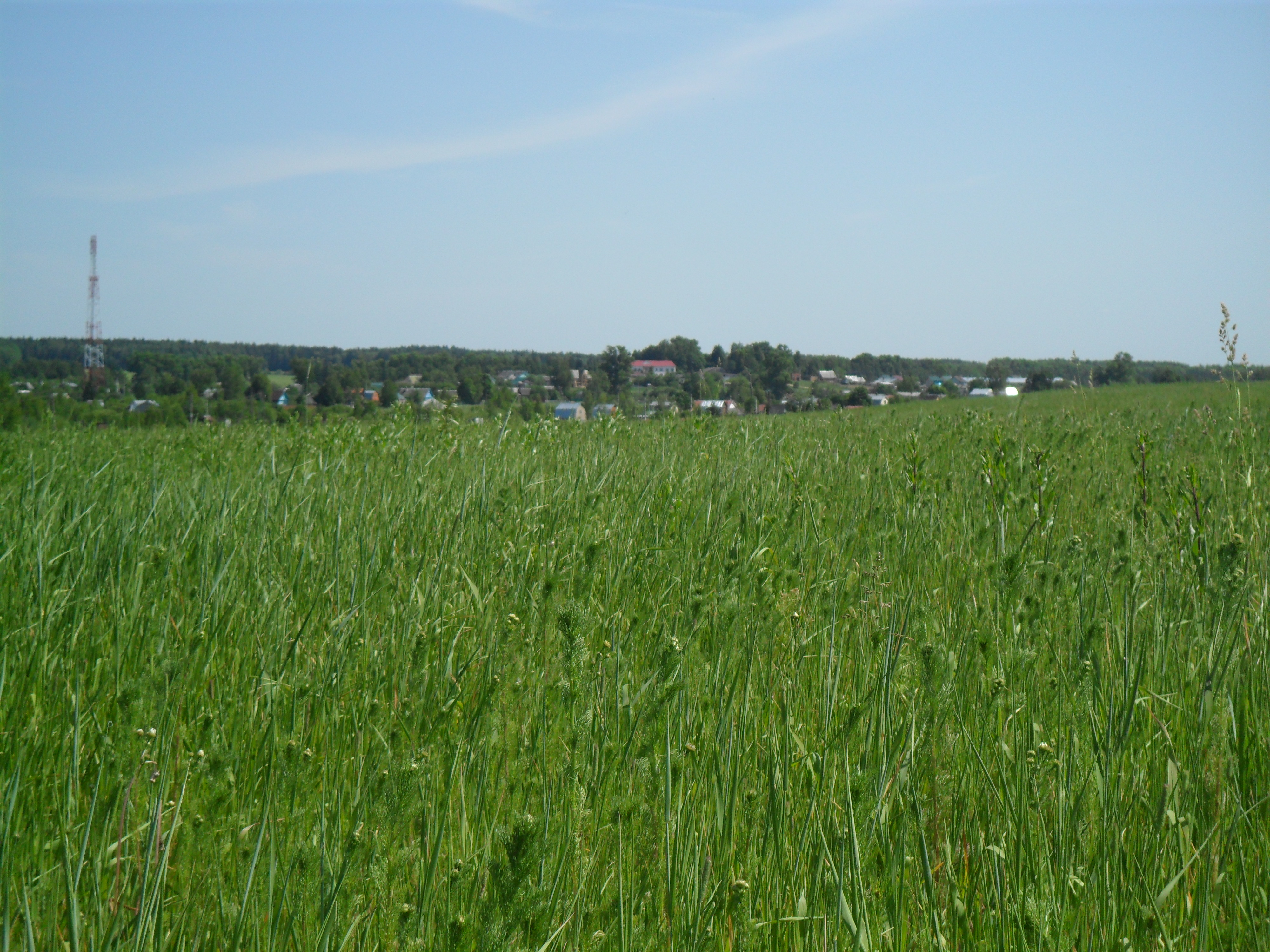 Грибцово - деревня в Рузском районе МО.